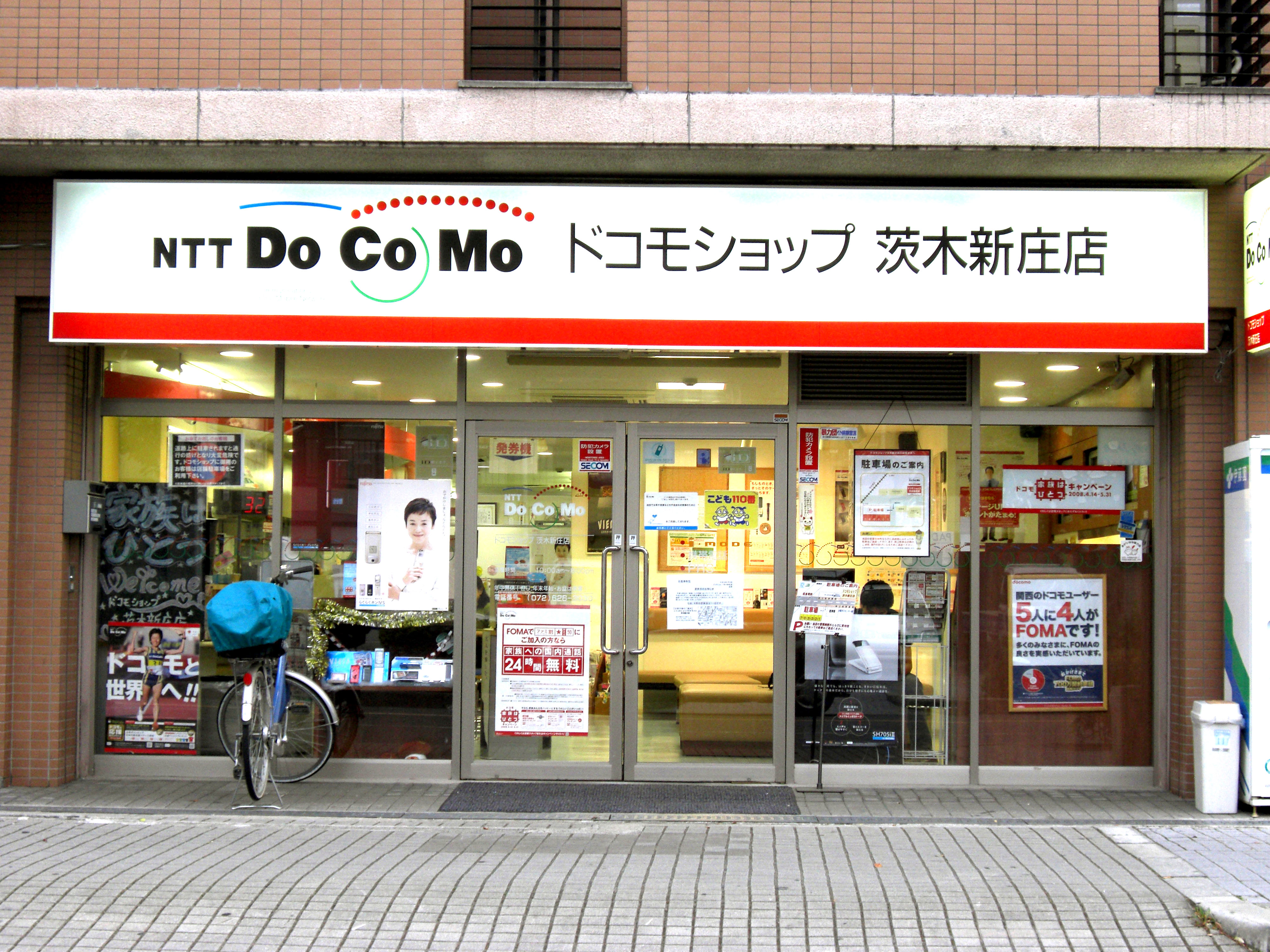 DoCoMo Shop Ibaraki-Shinjo,Shinjocho Ibaraki-City Osaka Japan.